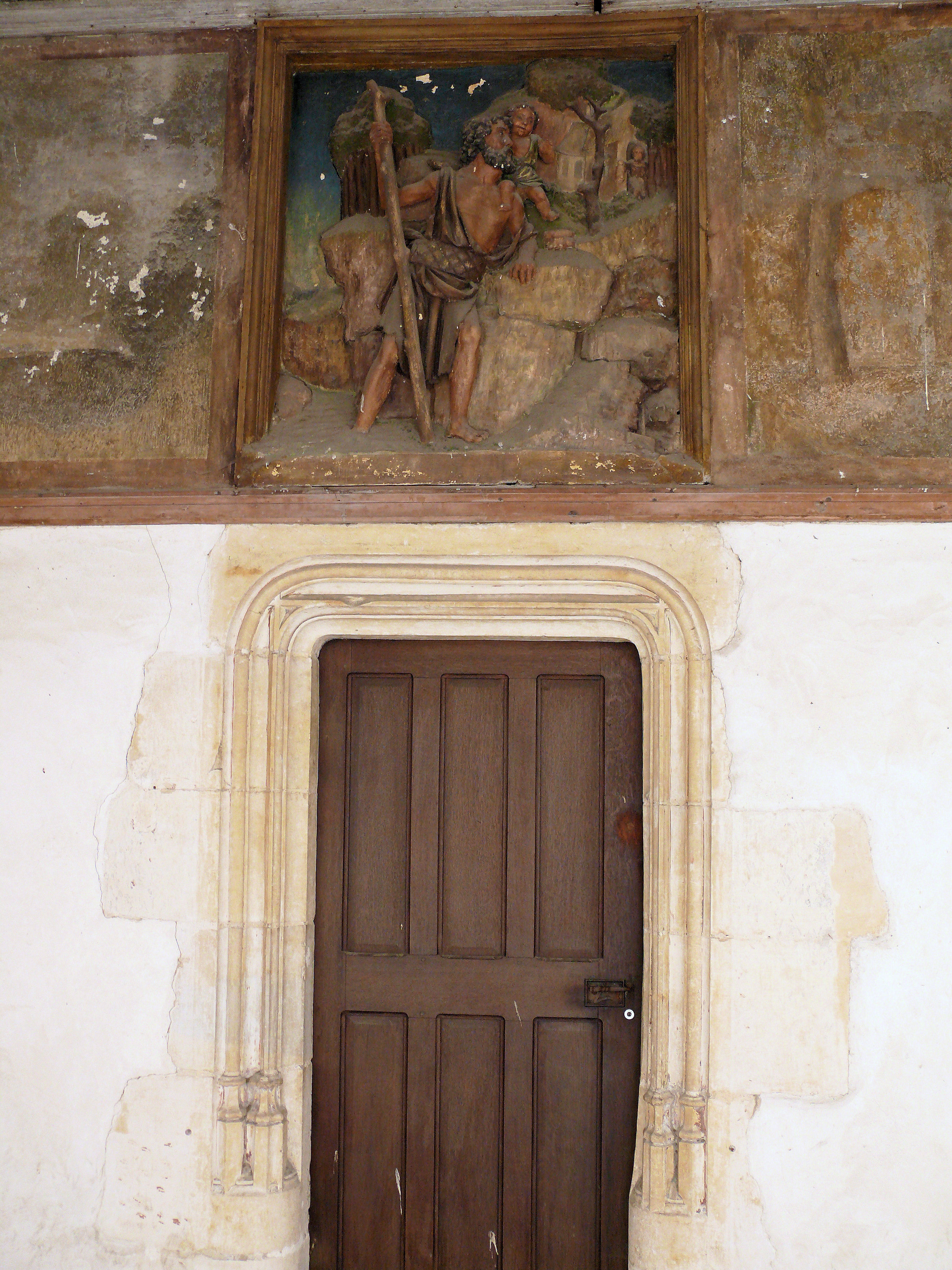 Bourges - Hôtel Lallemant - Décoration de la salle ouverte sur la cour